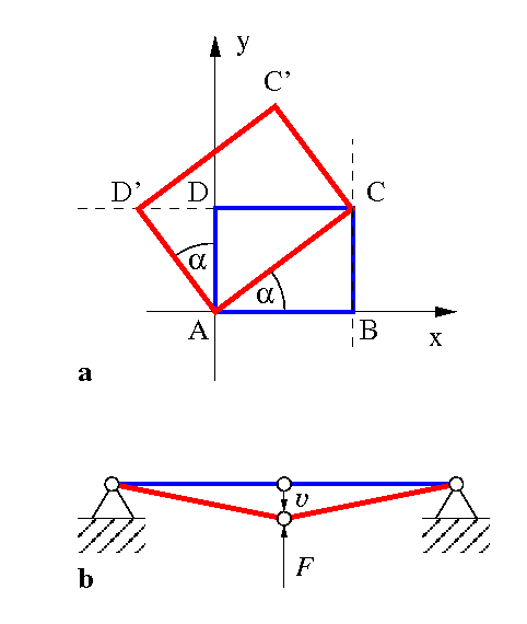 Drehung und Scherung eines Rechtecks (ABCD, Breite b, Höhe h, blau) zu einem Parallelogramm (AB'CD', rot)